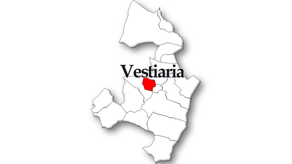 População